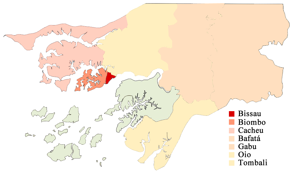 COVID-19 NA GUINÉ-BISSAU 1